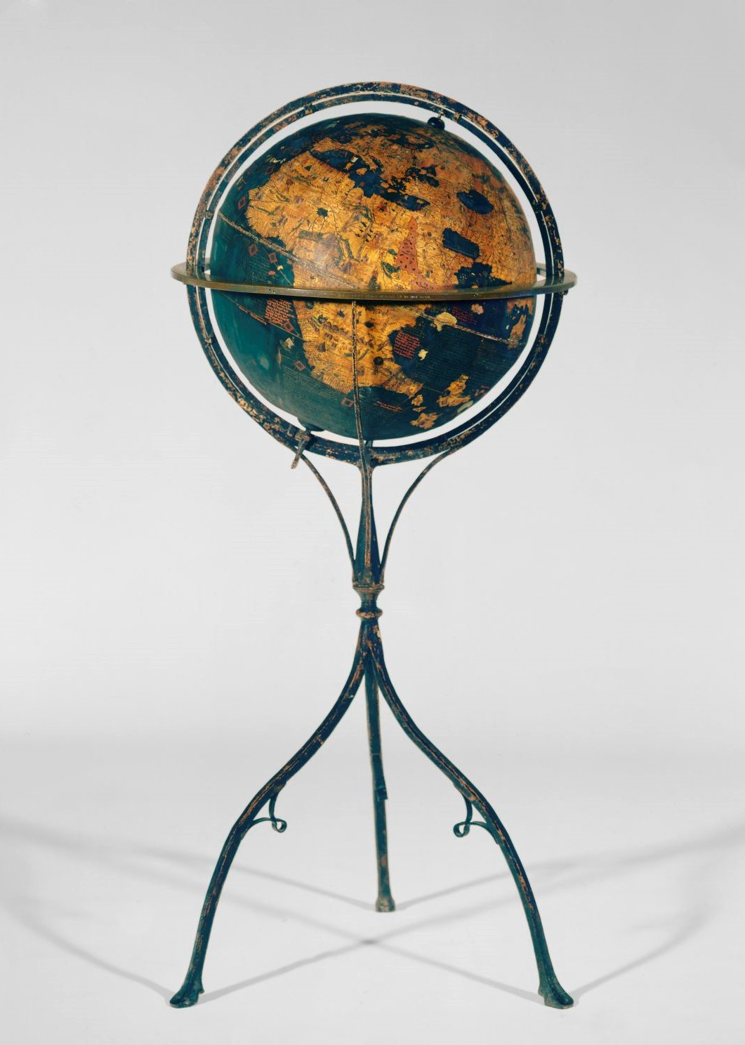 Hersteller: Entwurf: Martin Behaim (1459-1507), Bemalung: Georg Glockendon d.Ä. (gest. 1514) Datierung: 1492/94 und spätere Ergänzungen, Gestell 1510 um den Horizontring ergänzt Ort: Nürnberg Material/Technik: Geleimte Stoffe, Pergament, Papier bemalt; Eisen geschmiedet, bemalt; Messing gegossen, punziert, graviert Maße: H. 133 cm; D. 51 cm Ausstellungsort: Germanisches Nationalmuseum in Nürnberg